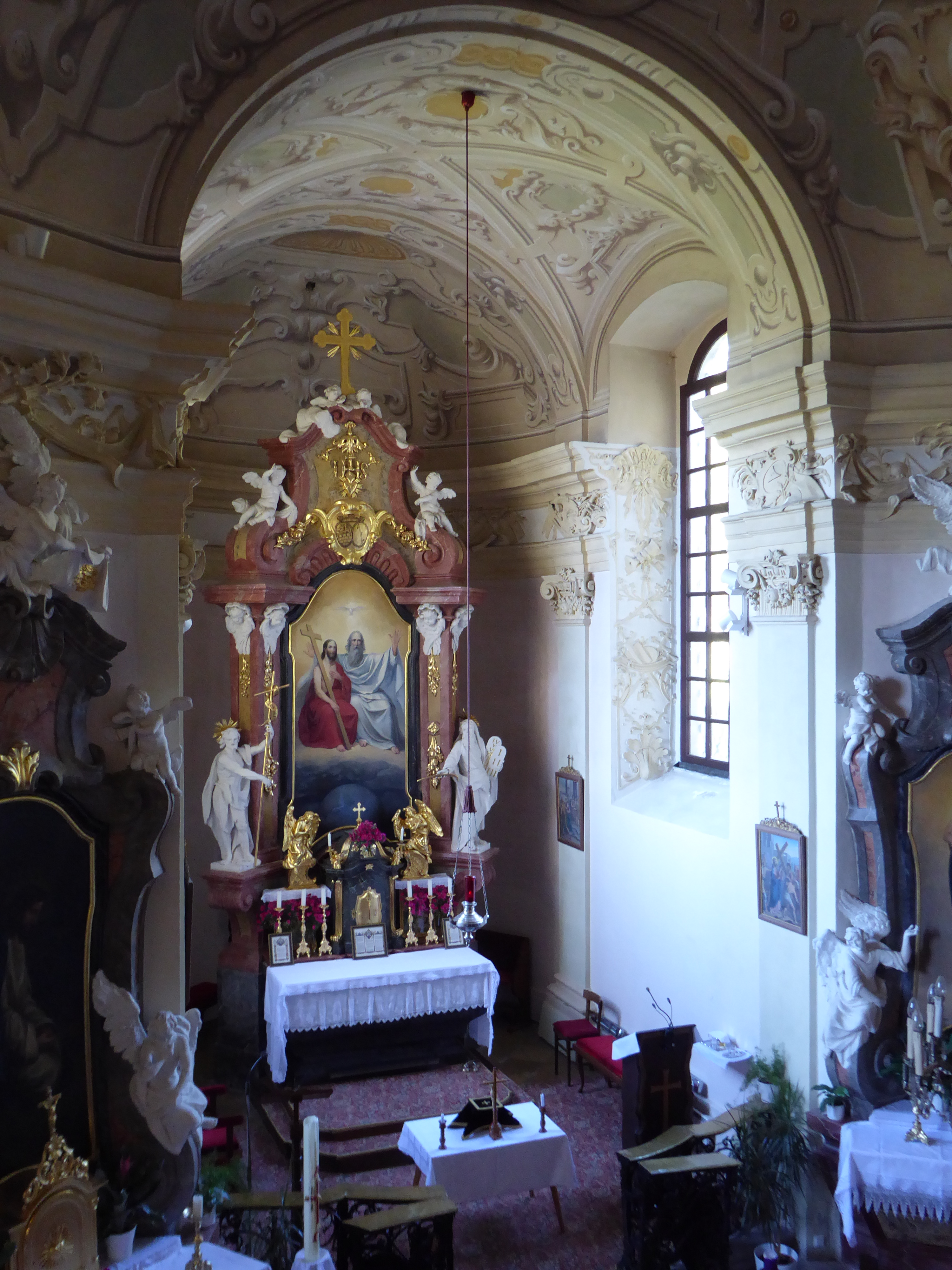 Pfarrkirche hl. Dreifaltigkeit, Rosenau Schloss, Zwettl, Niederösterreich - Hochaltar